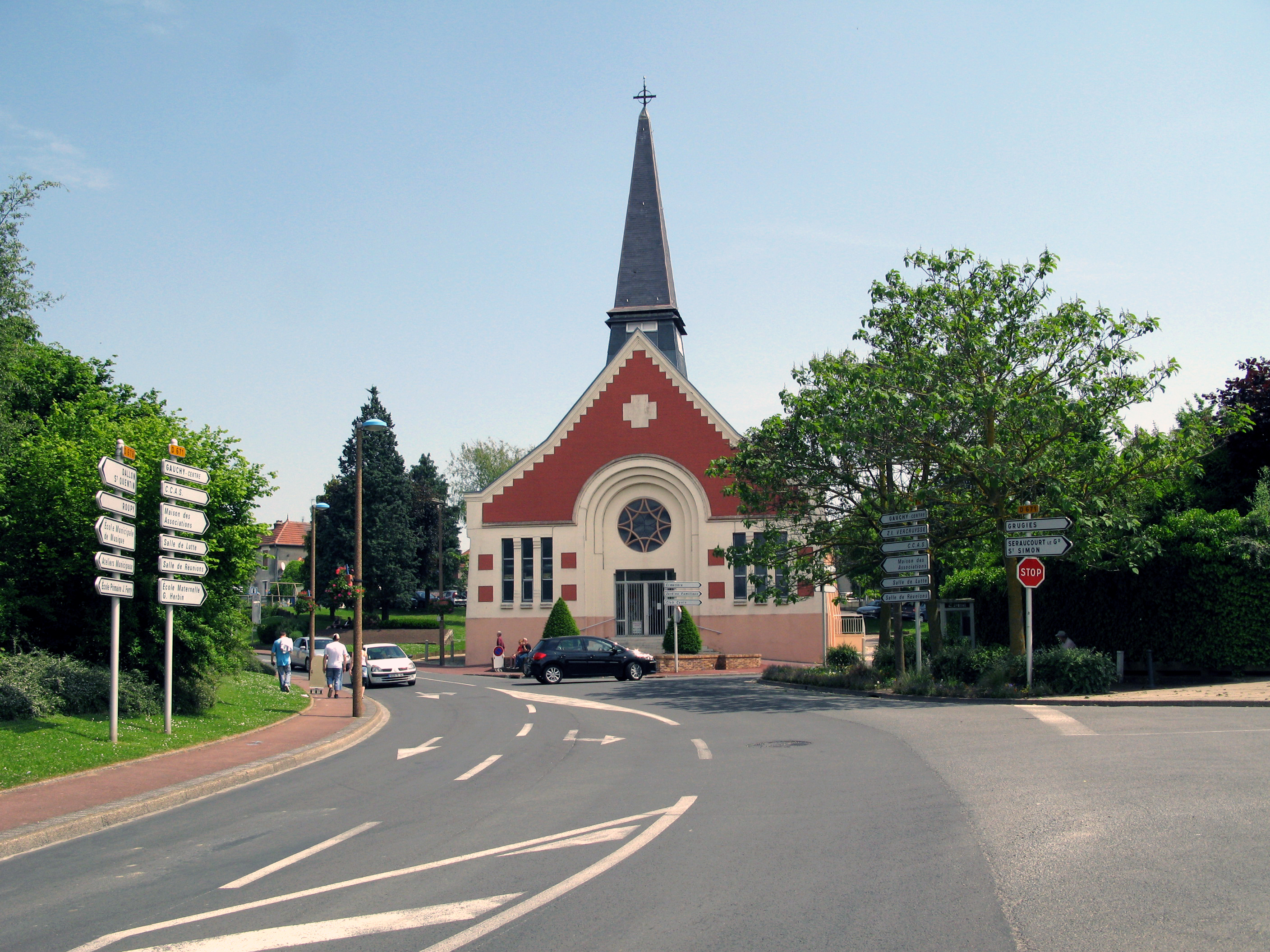 Gauchy (Aisne, France) - L'église.